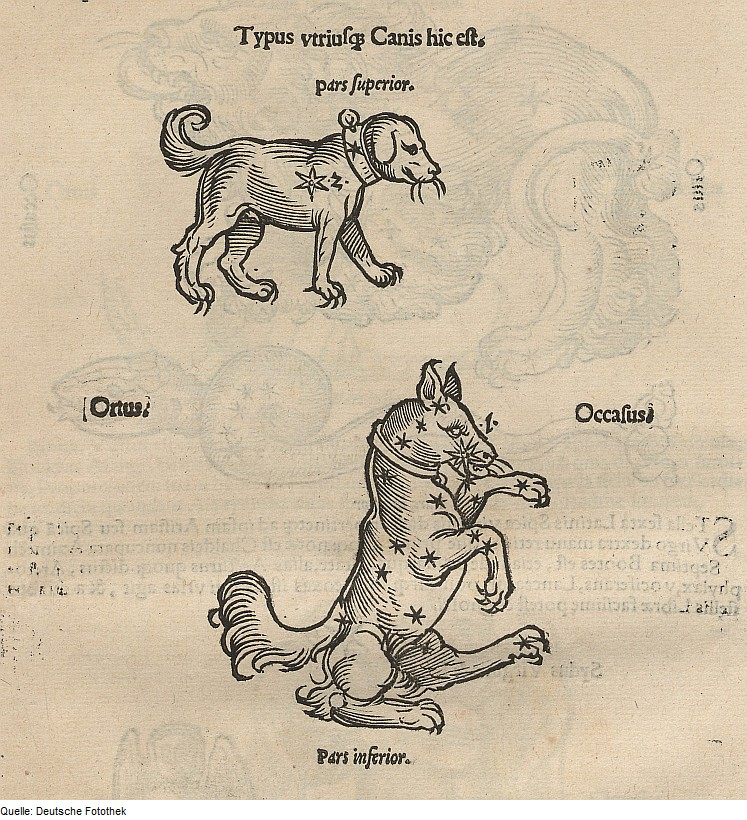 Original image description from the Deutsche Fotothek Astronomie & Gestirn & Sternbild